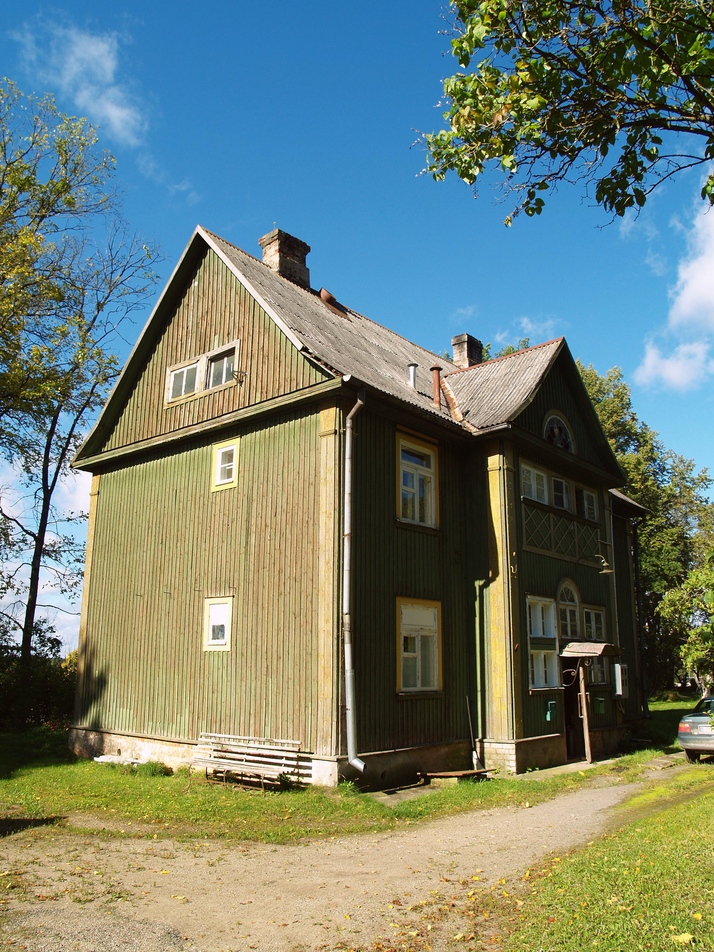 Leon Johansoni tüüpkavandi järgi ehitatud elamu Tõõraste külas, Reola rauteepeatuse lähedal. Hoone on heimatstiilis ja ekspressionismi sugemetega.